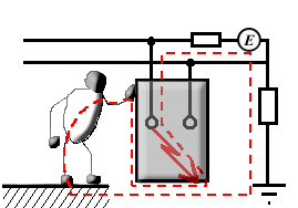 autore: Len zuò descrizione: schema del contanto indiretto